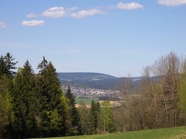 Blick auf Neureichenau